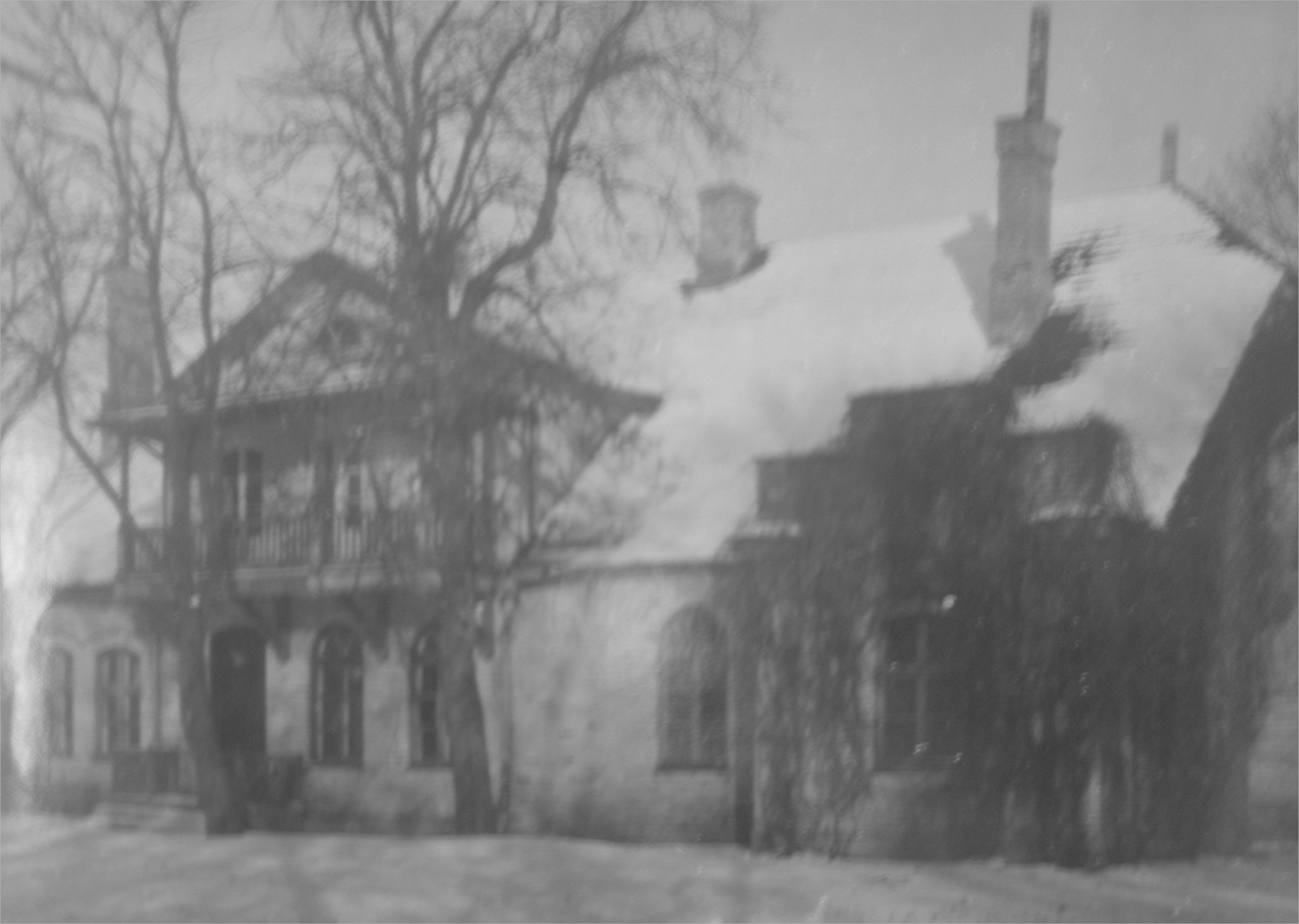 Leetse mõisa eestvaade, 1922, foto Aleksander Kink